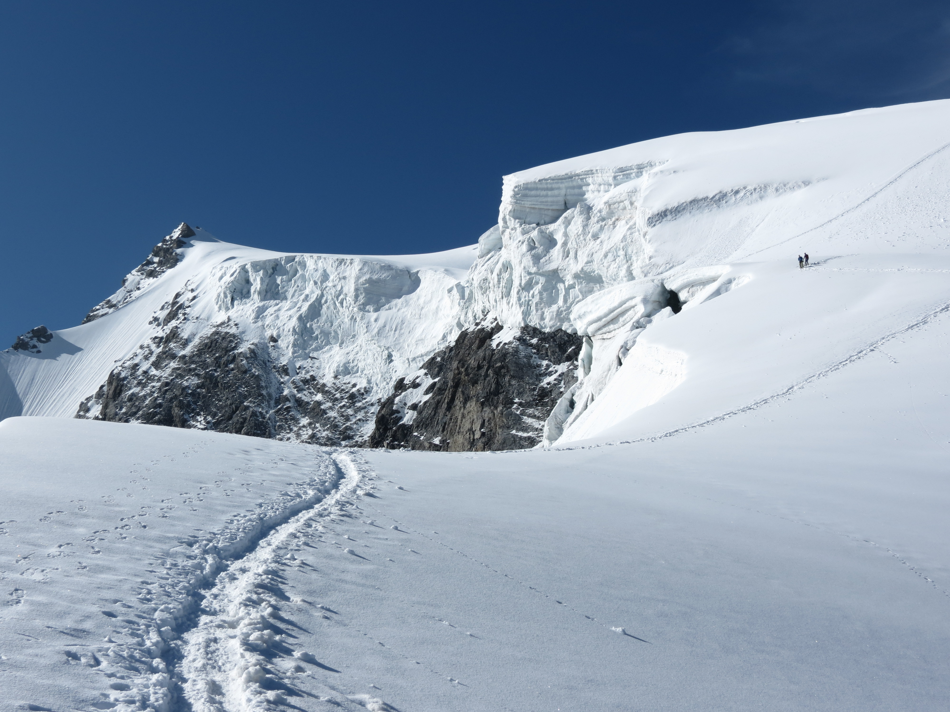 Ortler